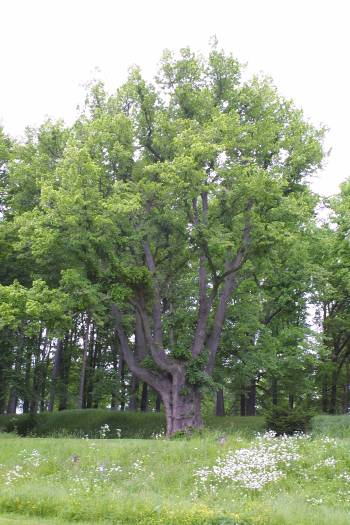 Lípa velkolistá v zámeckém parku v Chyši u Žlutic.